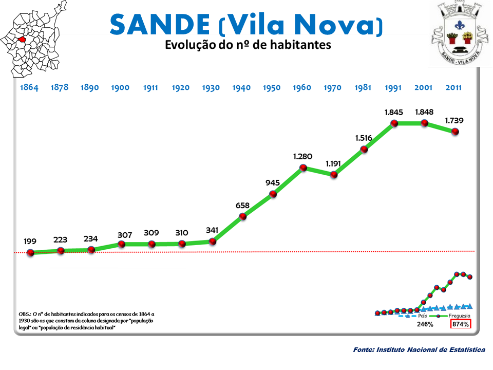 Censo 2011